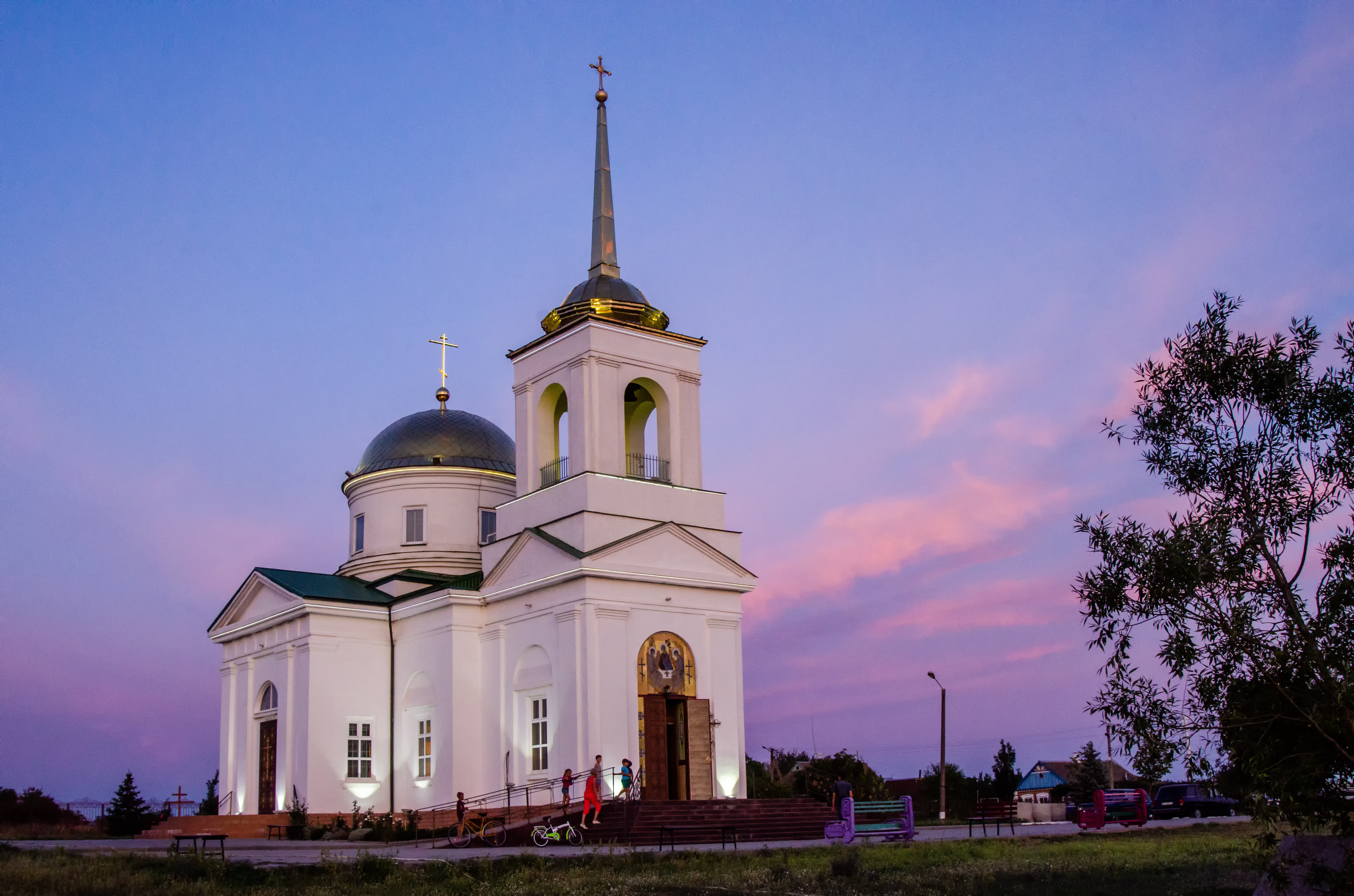 Побудована на території с.Обіточное, в 1814-1818-х рр. в ознаменування перемоги Росії у Вітчизняній війні 1812 р. Спорудження в плані має хрестоподібну форму. Три його торцевих стіни оброблені у вигляді четирехпілястрових портиків з фронтонами, а до четвертої примикала дзвіниця, розібрана в 1933р. Централцний обсяг будівлі переходить в світловий барабан, що має 8 віконних прорізів, і завершується напівсферичним куполом. Розпис інтер'єру складалася з 12 фресок, - 8 можуть бути відновлені. За своєю архітектурою пам'ятник відноситься до періоду пізнього класицизму на Україні.